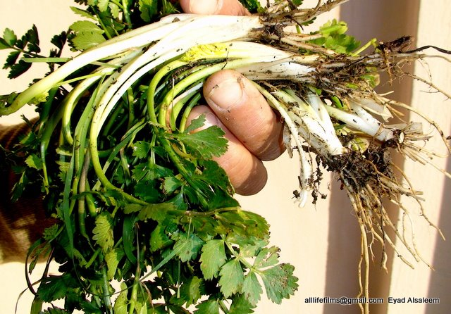 نباتات برّية سورية تؤكل